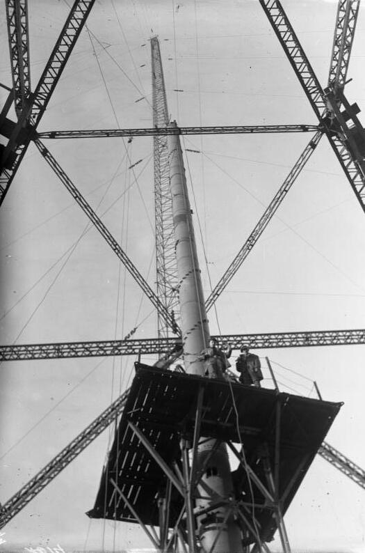 Der größte Funkturm in Deutschland wird augenblicklich in Königswusterhausen errichtet. Er wird eine Höhe von 230 Meter erreichen und mit einem Fahrstuhl, welcher bis in die äußerste Spitze emporgeht, ausgestattet sein. Der Funkturm ruht auf drei Beinen und ist so gebaut, daß er keiner Verspannung bedarf. Blick auf den Fahrstuhl des neuen Funkturmes welcher innerhalb desselben bis in die äusserste Spitze führen wird.